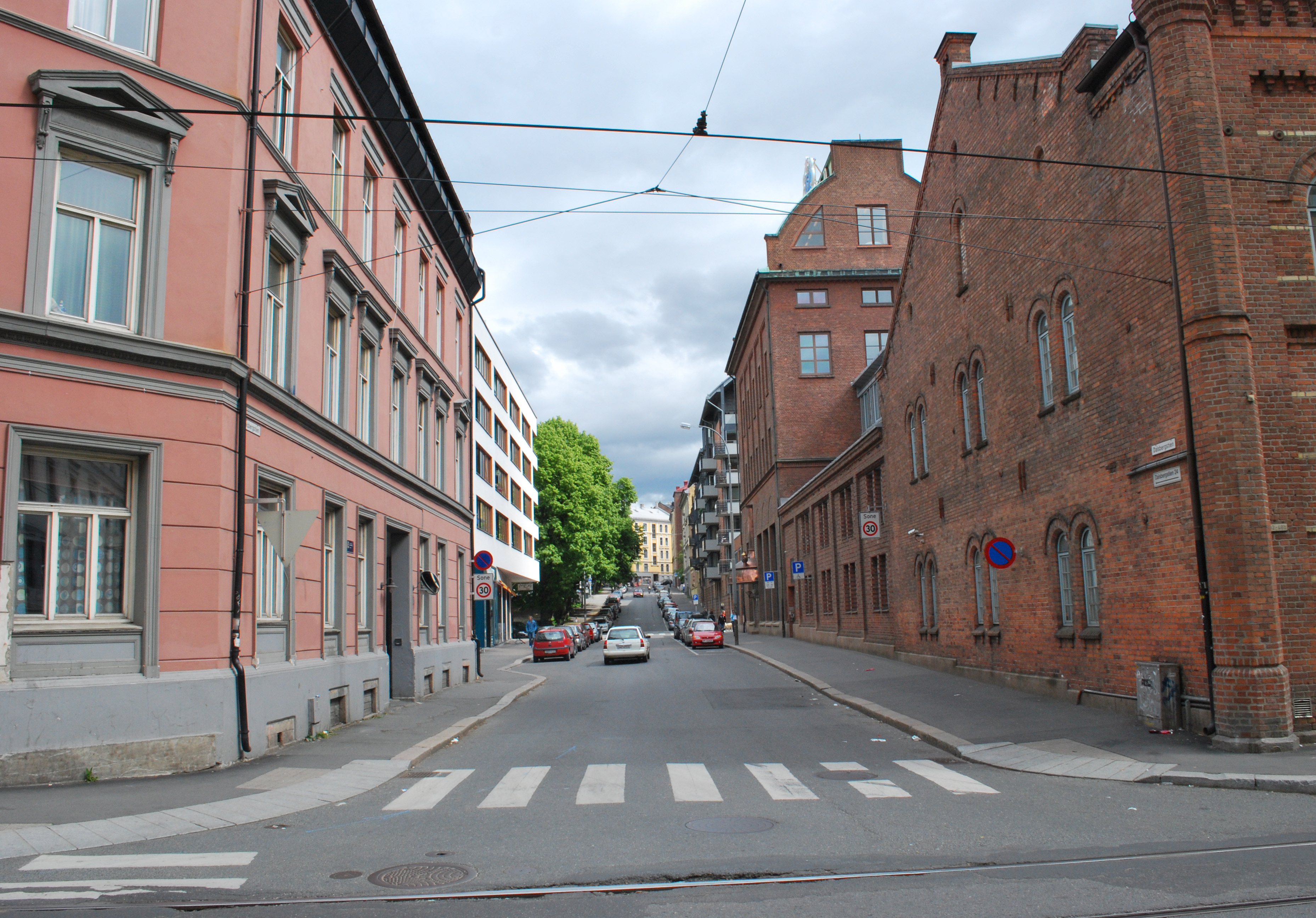 Dalsbergstien, Bislett, sett fra Pilestredet mot Sofies plass